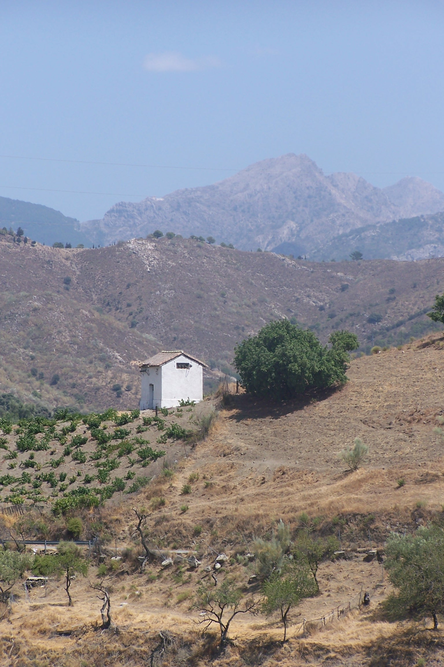 bij Canillas de Aceituno